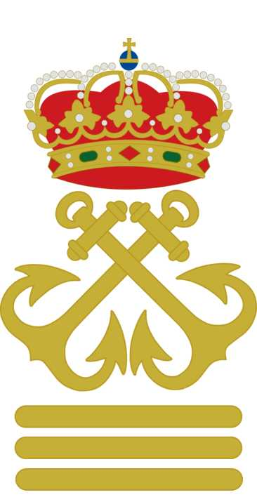 insignia capitán de yate